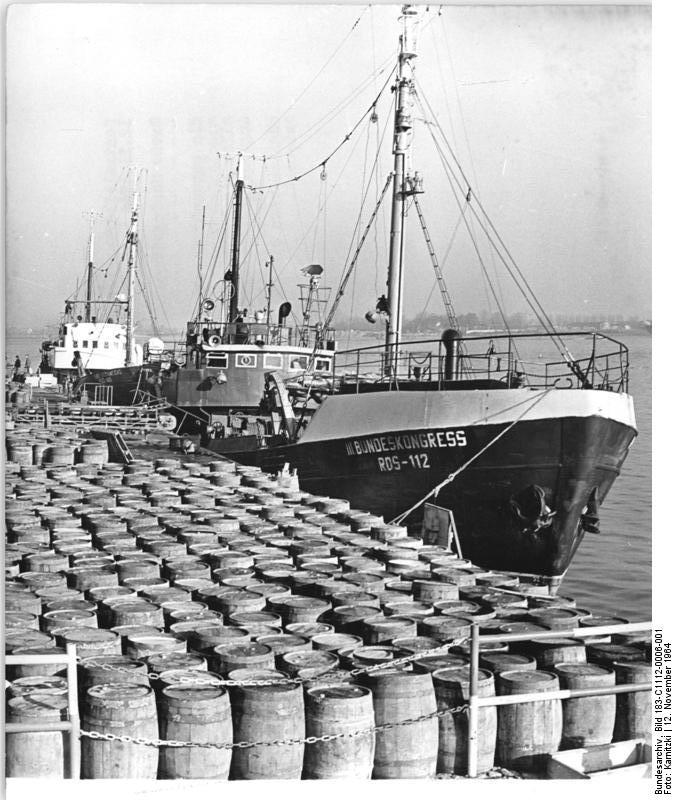 Rostock, Überseehafen, Verladung von Fisch Zentralbild Karnitzki 12.11.1964 Große Heringsfänge...., die gegenwärtig von den Rostocker Hochseefischern angelandet werden, lassen in den nächsten Tagen in allen Fischverkaufsstellen der Republik ein günstiges Angebot netzfrischer grüner Heringe erwarten. Auch diese Fässer gelangen in die Bezirke der DDR. Zweimal täglich wird die Kühlkette rollender Spezialwaggons erneuert.